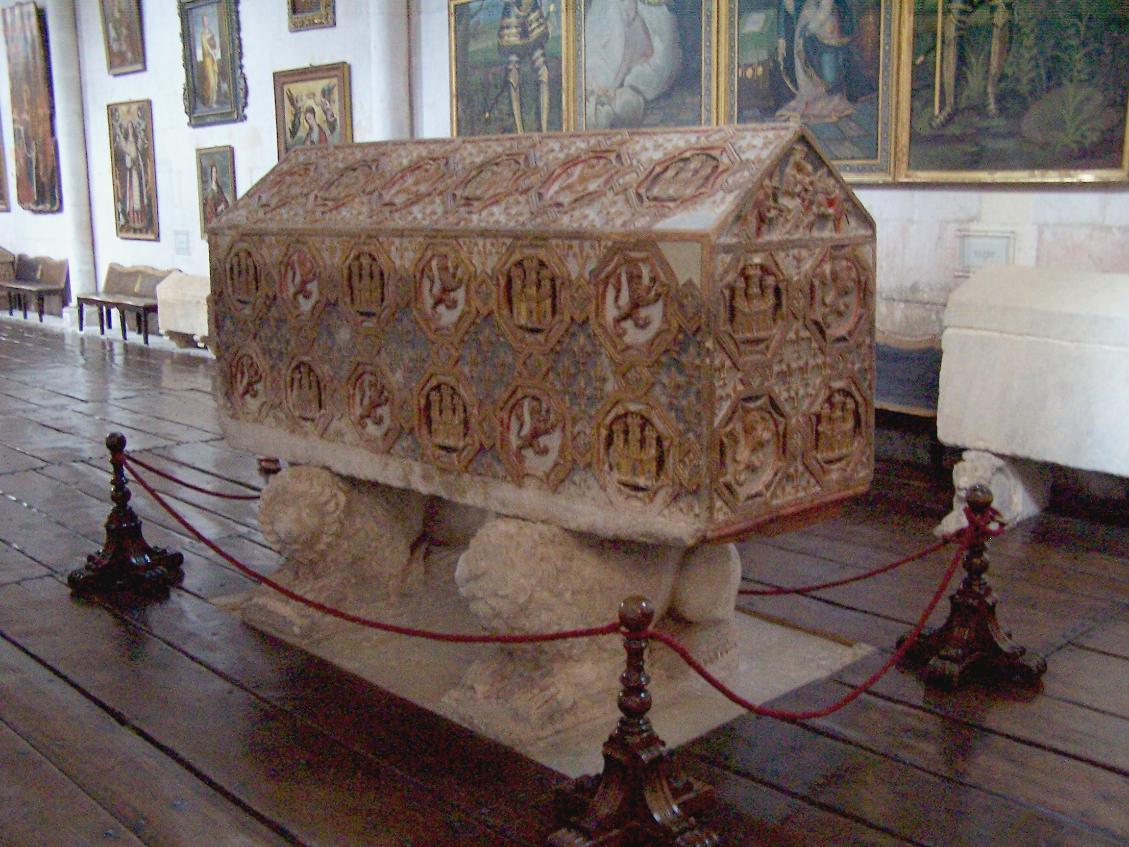 Sepulcro de Alfonso de la Cerda «el Desheredado» (1270-1333), hijo del infante Fernando de la Cerda y nieto del rey Alfonso X de Castilla. El sepulcro se encuentra en el monasterio de las Huelgas de Burgos, y en el mismo monasterio se encuentra el sepulcro de su padre, el infante Fernando de la Cerda.